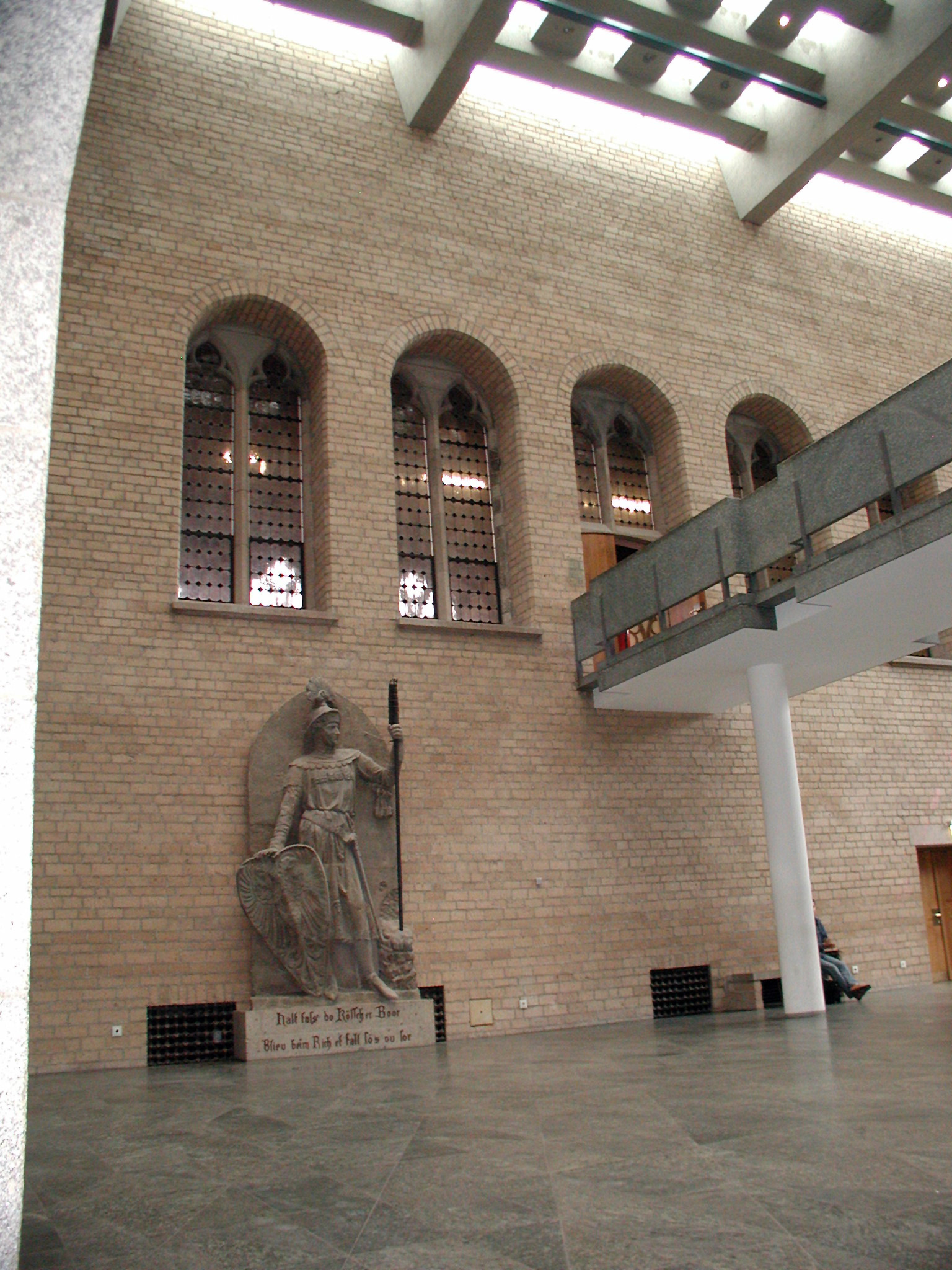 Kölm-Rathaus, Piazzetta mit "Kölner Bauer"